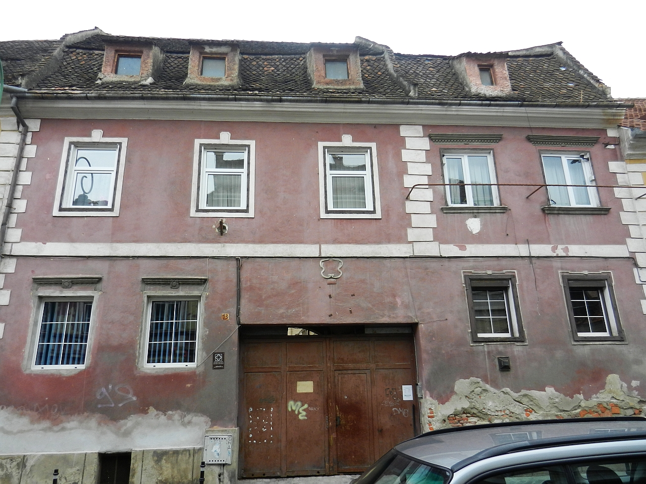 Casă monument istoric